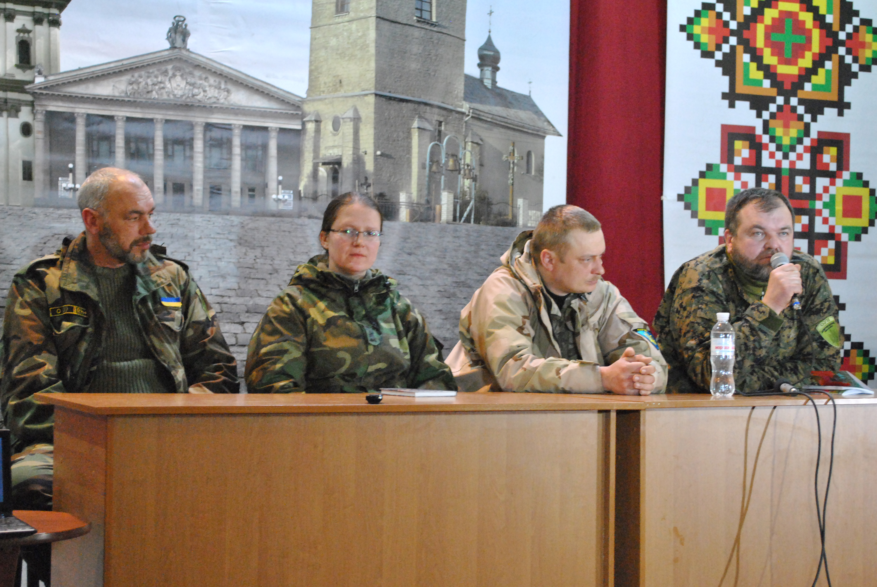 Зустріч із Борисом Гуменюком та його побратимами з батальйону «ОУН» в Українському Домі «Перемога» в Тернополі 2 березня 2015 року: презентація «Віршів з війни» та розмова про війну та її Героїв. Перший зліва — заступник командира батальйону ОУН Василь Кіндрацький.